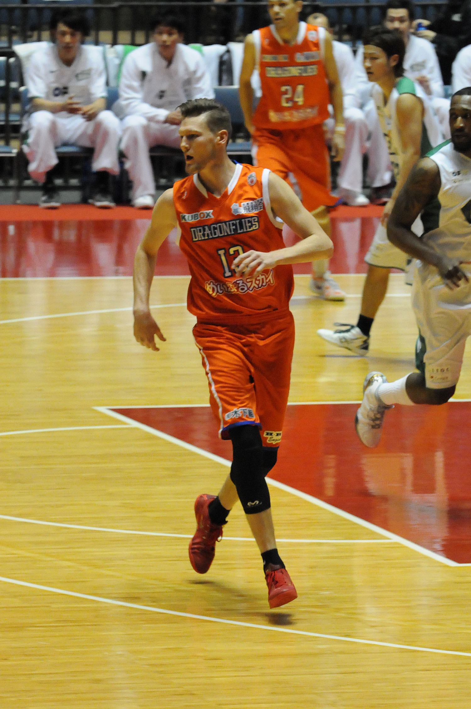 広島ドラゴンフライズ、クリント・チャップマン選手。代々木第一体育館で。